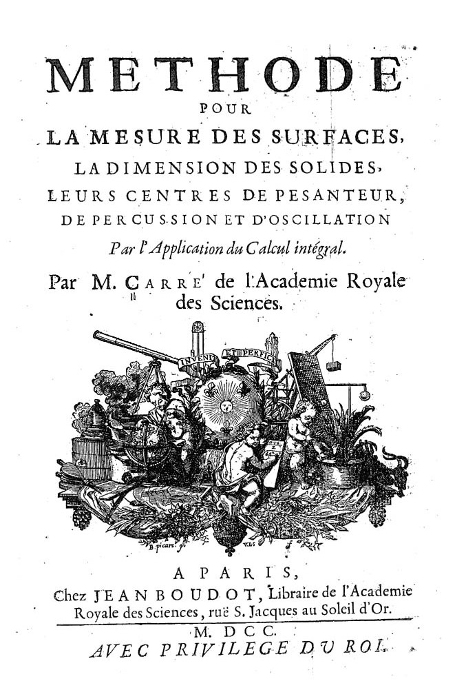 Methode pour la mesure des surfaces, la dimension des solides, leurs centre de pesanteur, de percussion et d'oscillation ... Par M. Carré de l'Academie Royale des sciences. - A Paris : chez Jean Boudot, libraire de l'Academie Royale des sciences, rue S. Jacques au Soleil d'or, 1700. - 115 p. ; 4º .